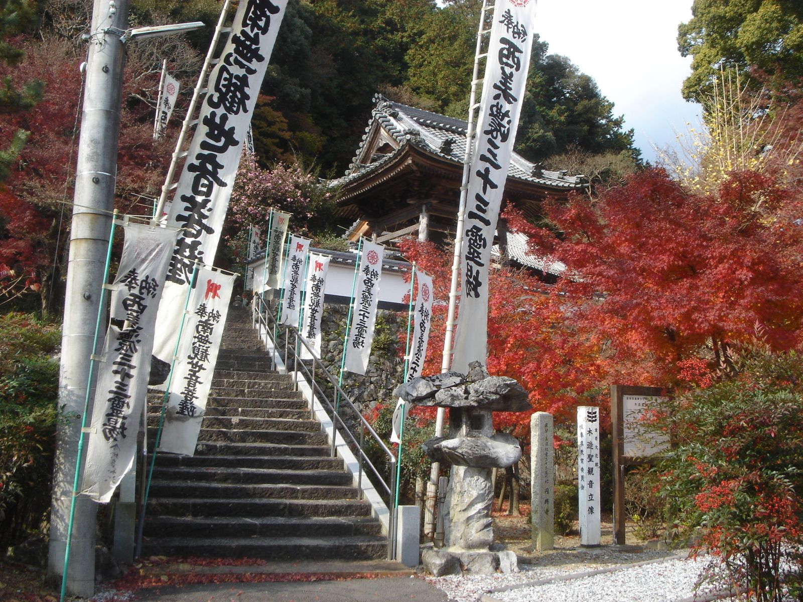 Enko-ji(Temple)(円興寺),Ogaki,Gifu,Japan(岐阜県大垣市)で撮影。